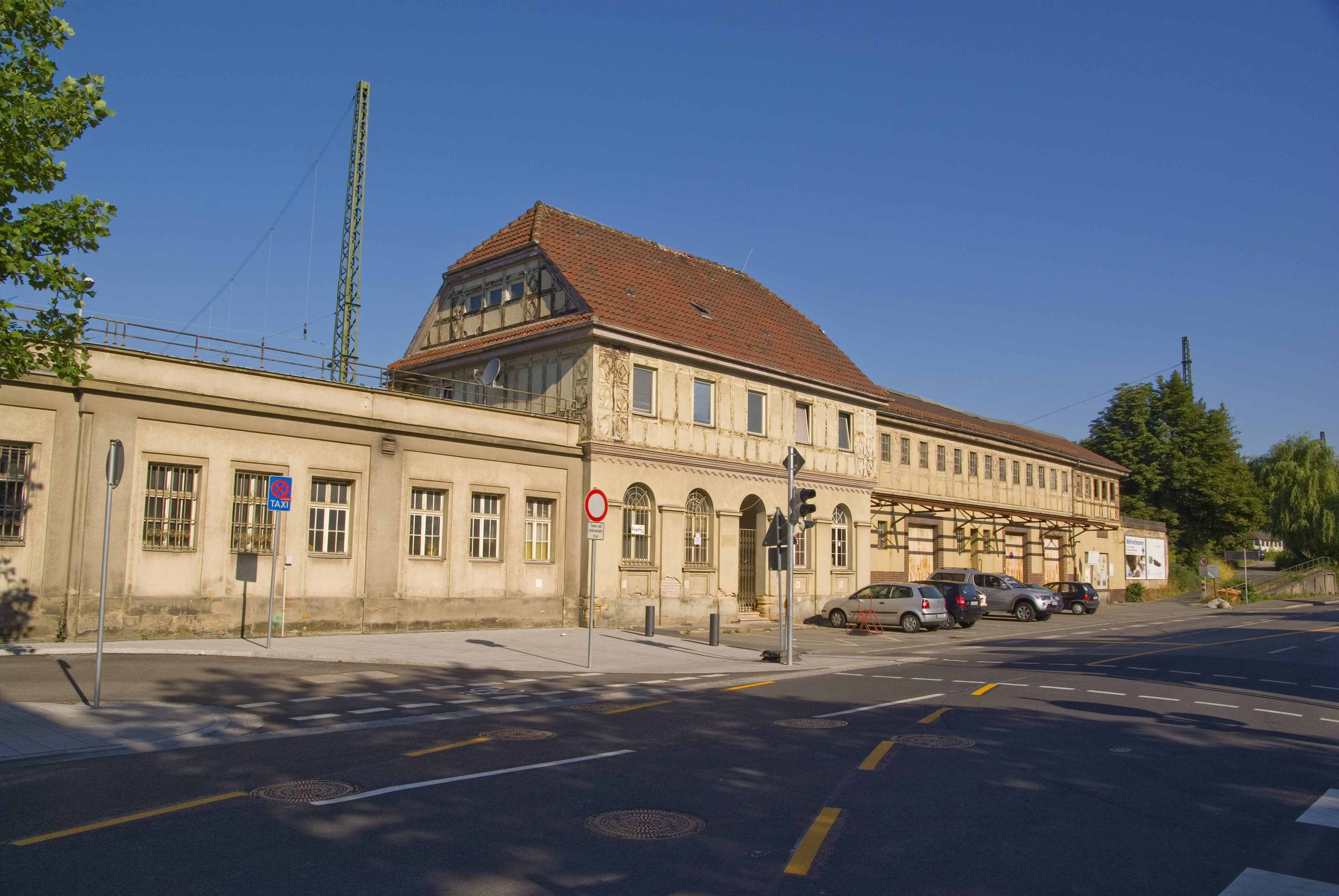 Altes Bahnhofgebäude Coburg